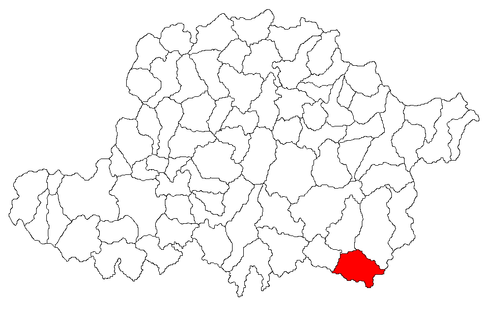 Categorie:Hărţi ale judeţului Arad